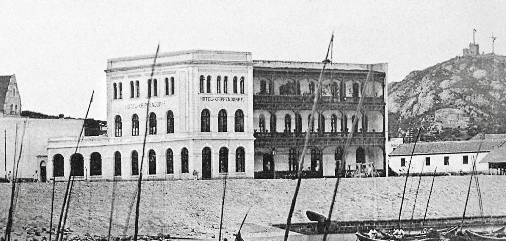 青岛克里本多夫饭店